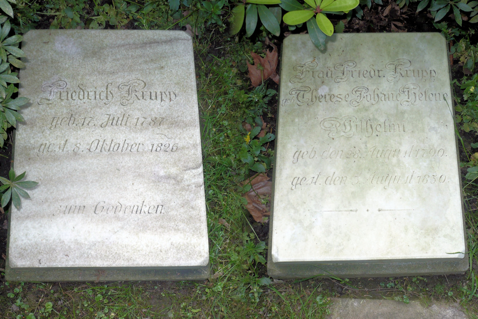 Grabmal von Friedrich Krupp und Therese geb. Wilhelmi auf dem Friedhof Bredeney in Essen